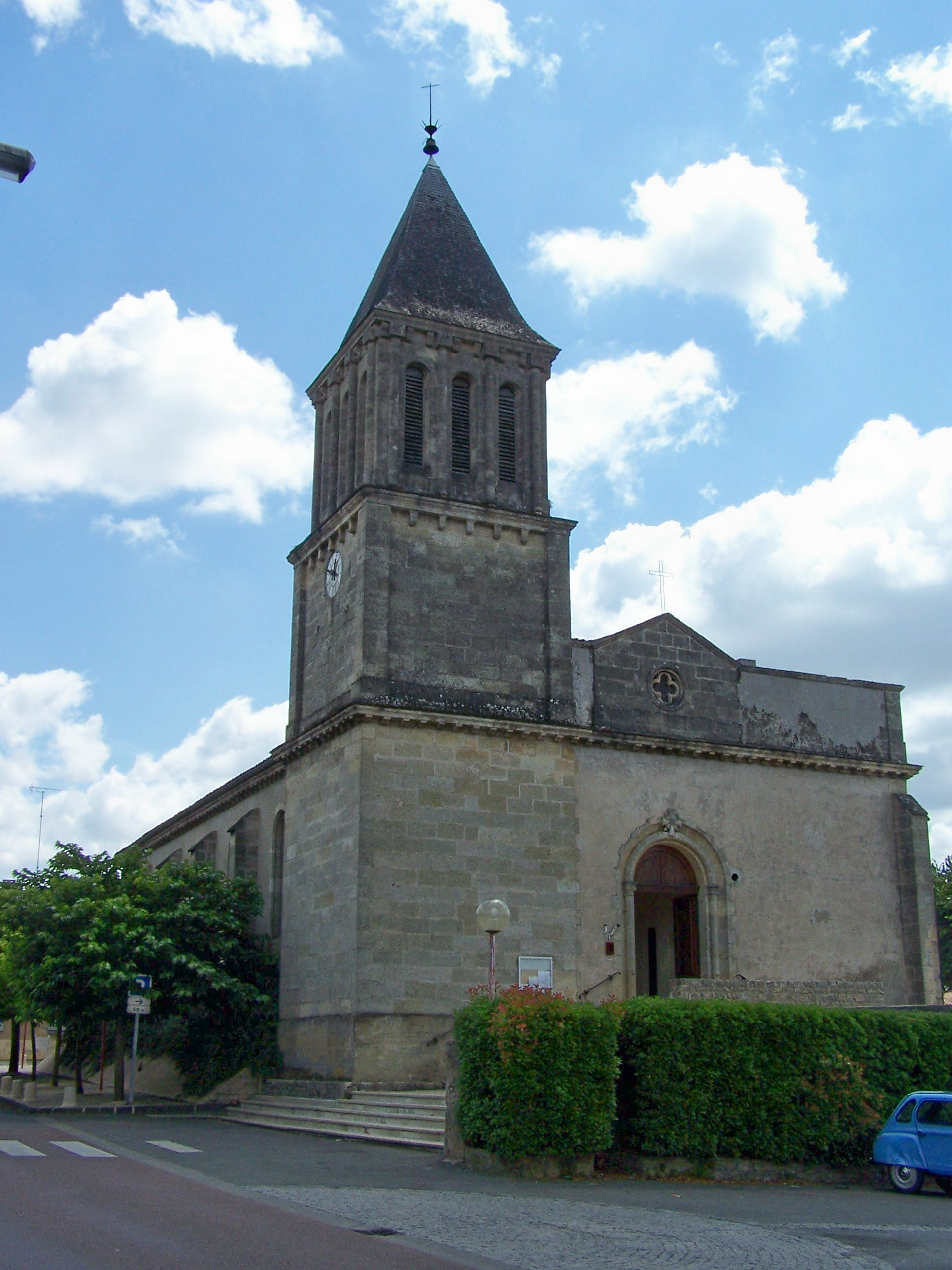 Église de Saint-Pierre-d'Aurillac, Gironde, France